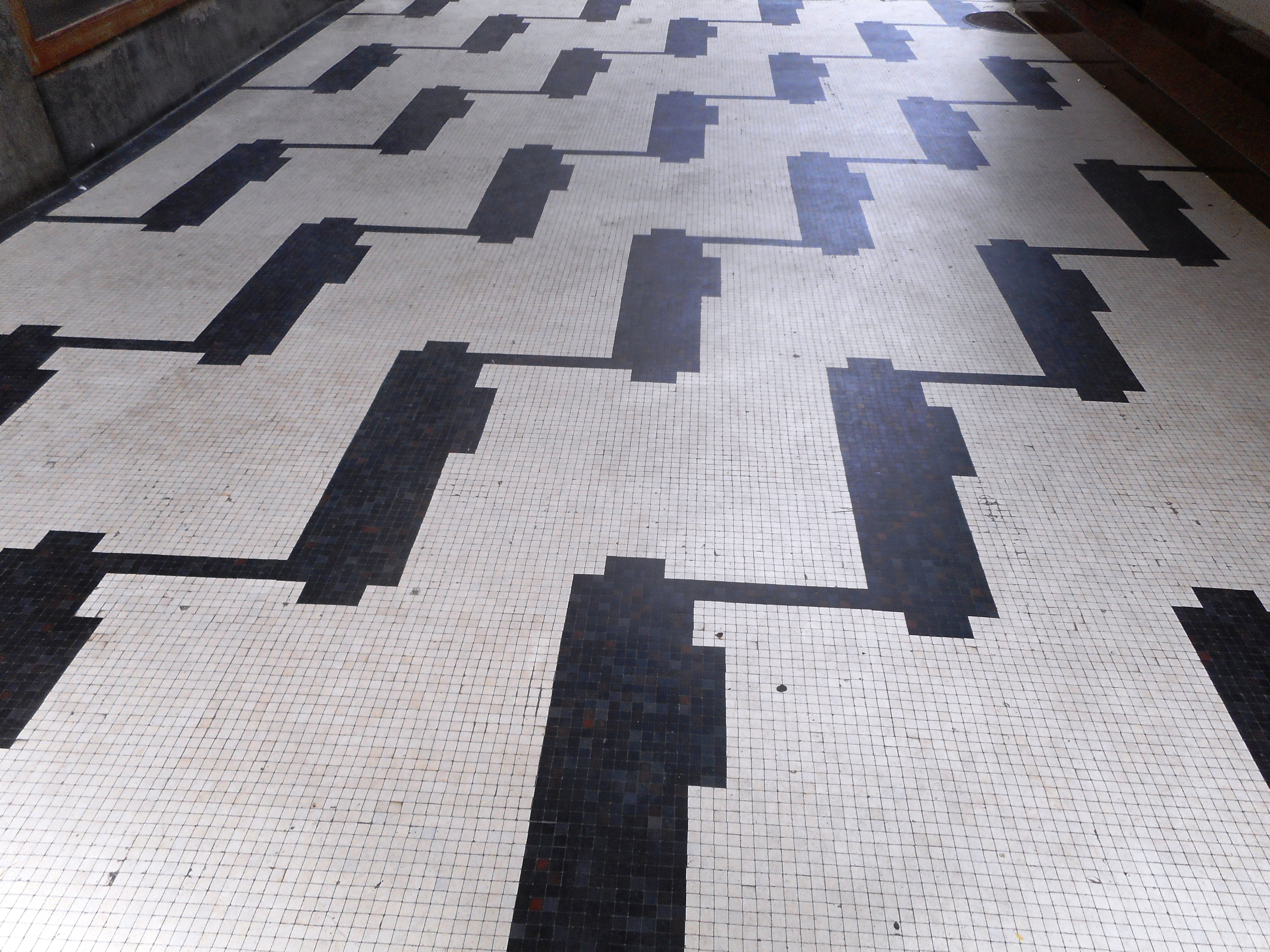 Pavimento della Galleria delle Vittorie con i fasci in mosaico